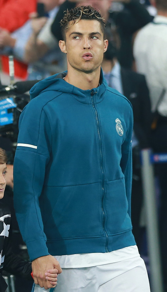 Финал ЛЧ в Киеве: 13-й кубок «Реала» и слёзы «Ливерпуля»